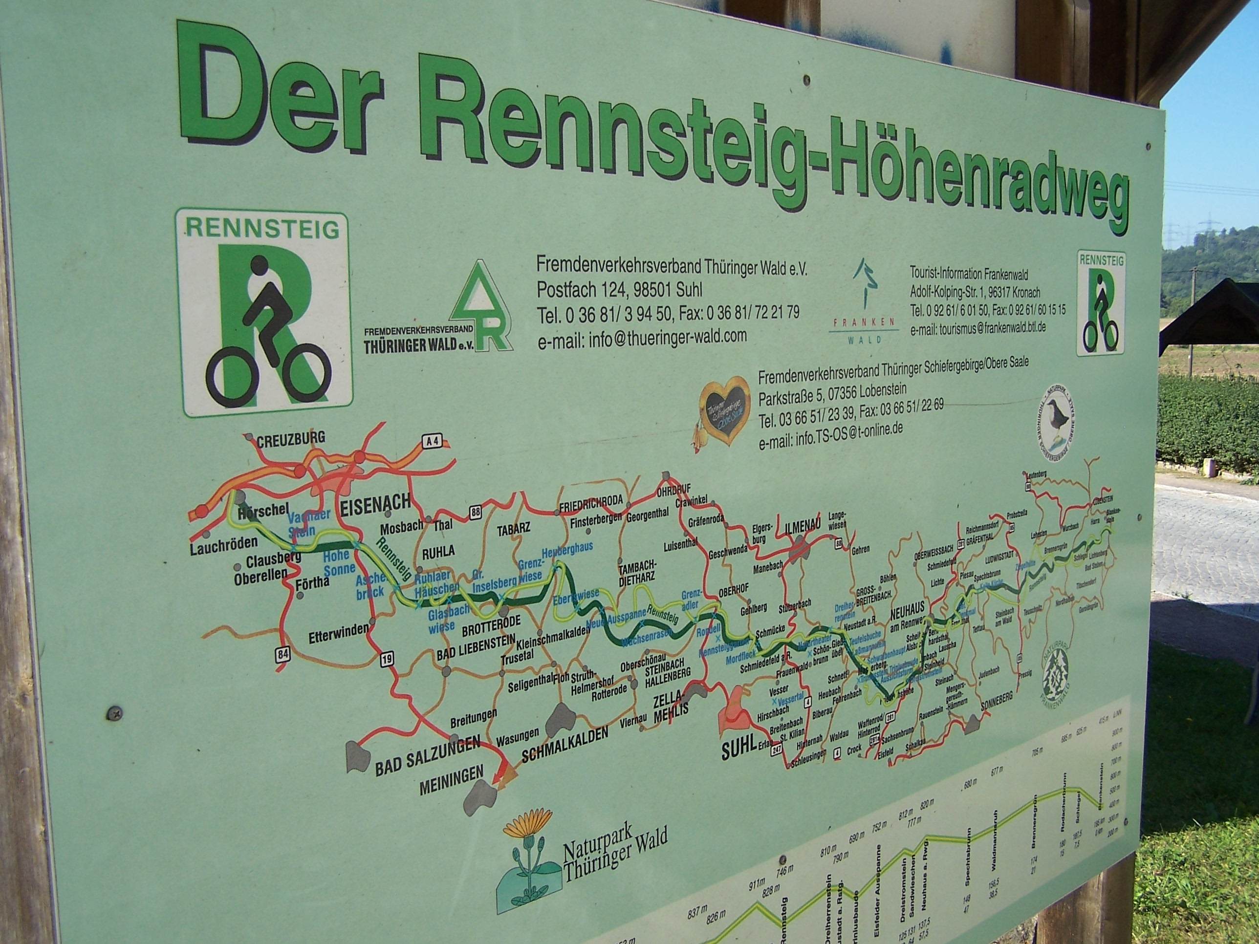 Infotafel zum Radweg am Startpunkt in Hörschel am Rennsteighaus.